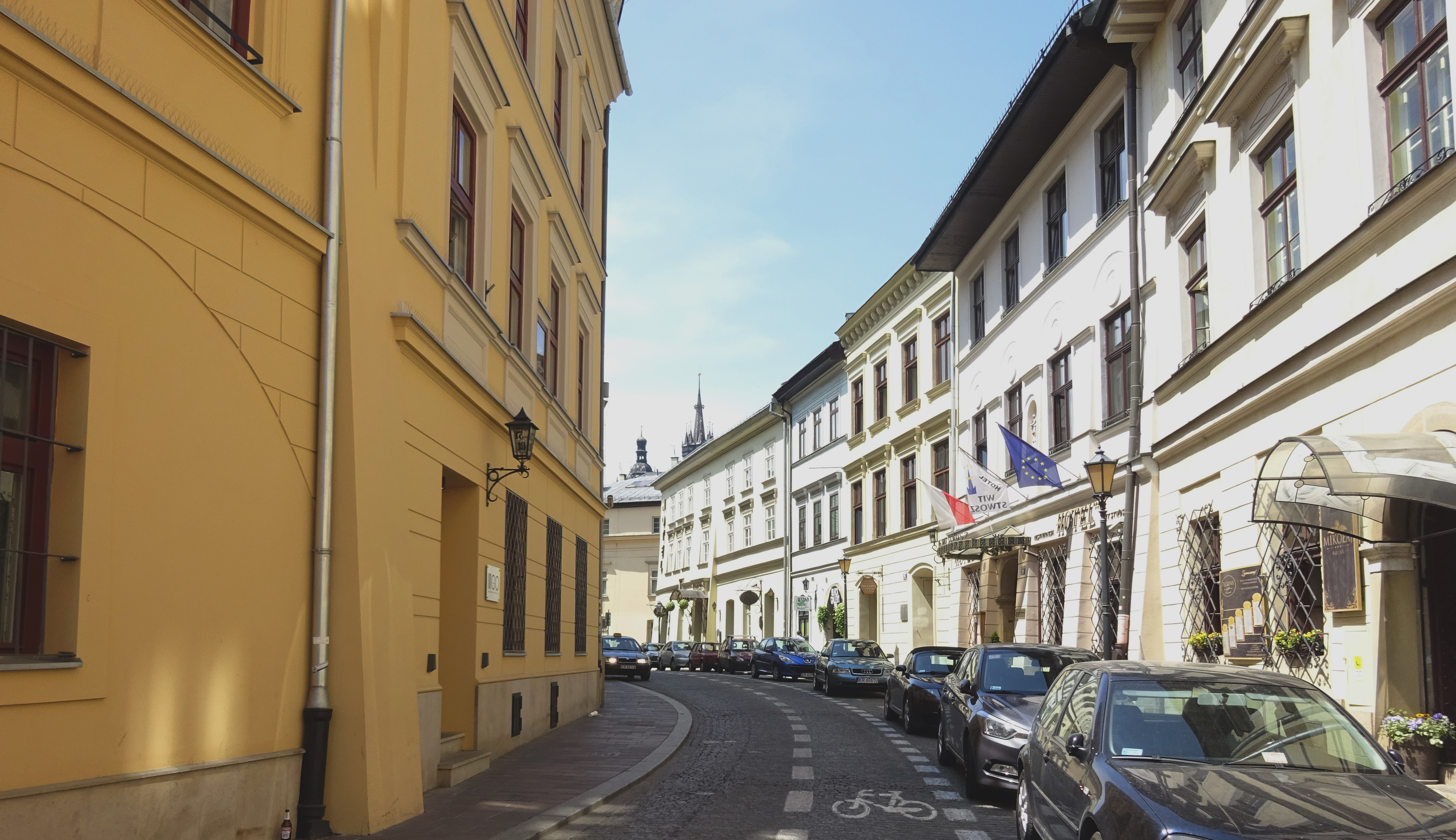 Ulica Mikołajska w Krakowie. Widok z Plant na zachód. 2016